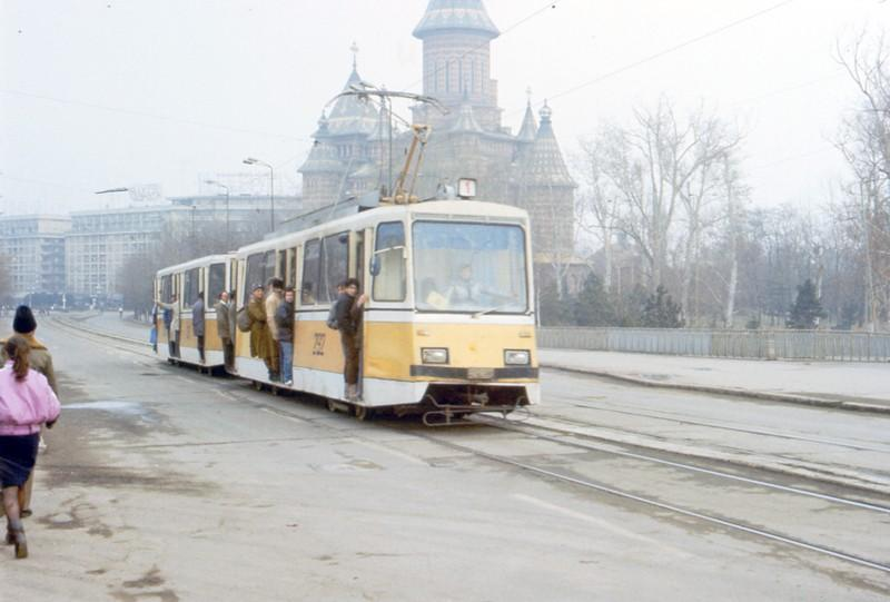 Tramvai Timisoara, Podul Traian